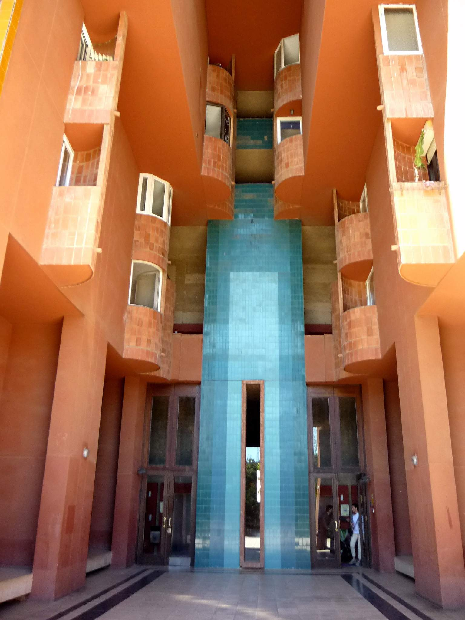 Sant Just Desvern - Edificio de viviendas Walden 7